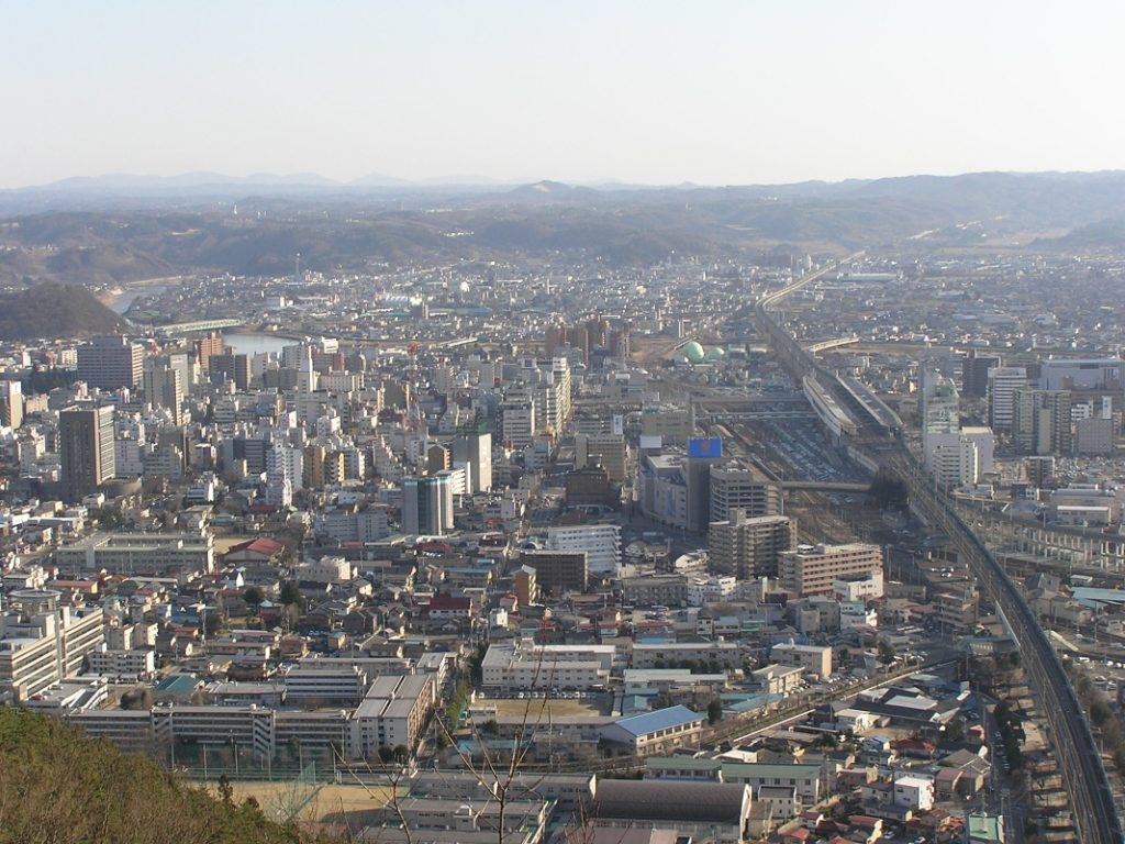 Fukushima city ,Japan.